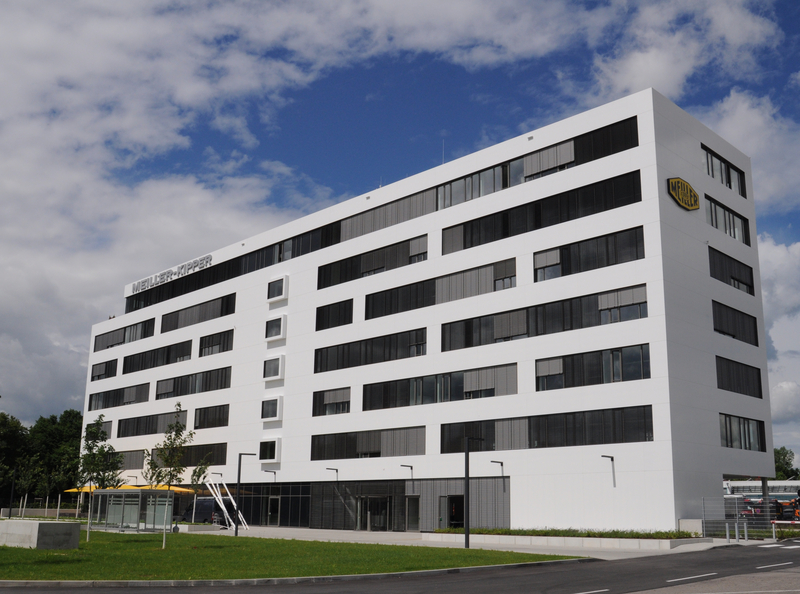 Verwaltungsgebäude MEILLER Kipper in der Ambossstraße 4 in 80997 München